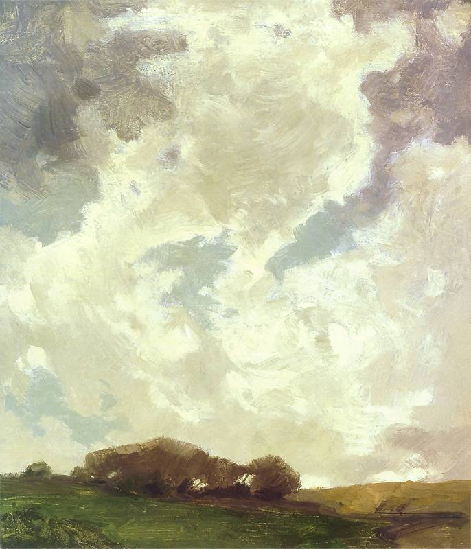 Pejzaż z kępą drzew